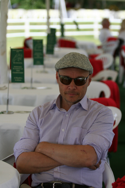 Animaatiotaiteilija, lastenkirjailija, kuvittaja Mikko Kunnas